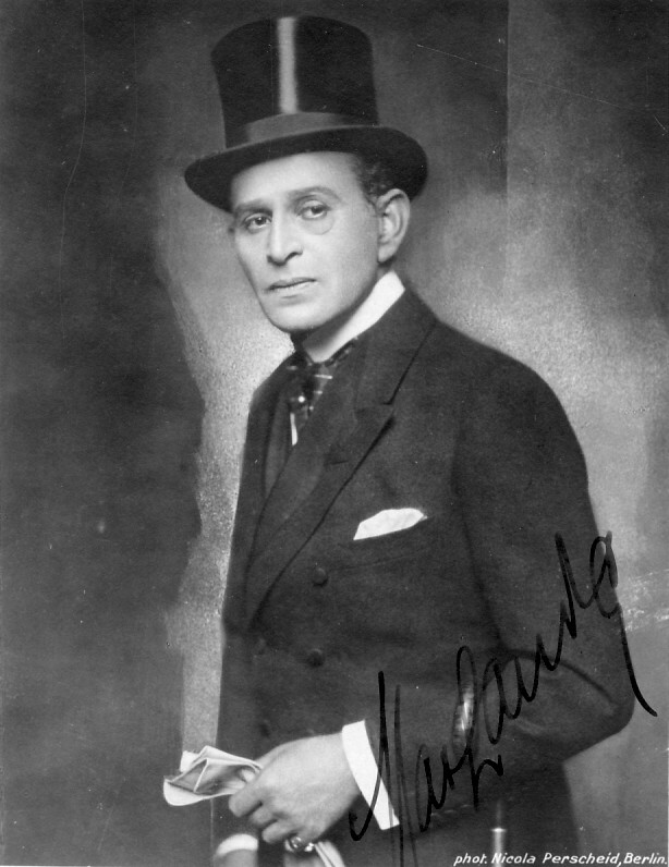 Stummfilmschauspieler Max Landa auf einer Fotografie von Nicola Perscheid, mit AK von Landa